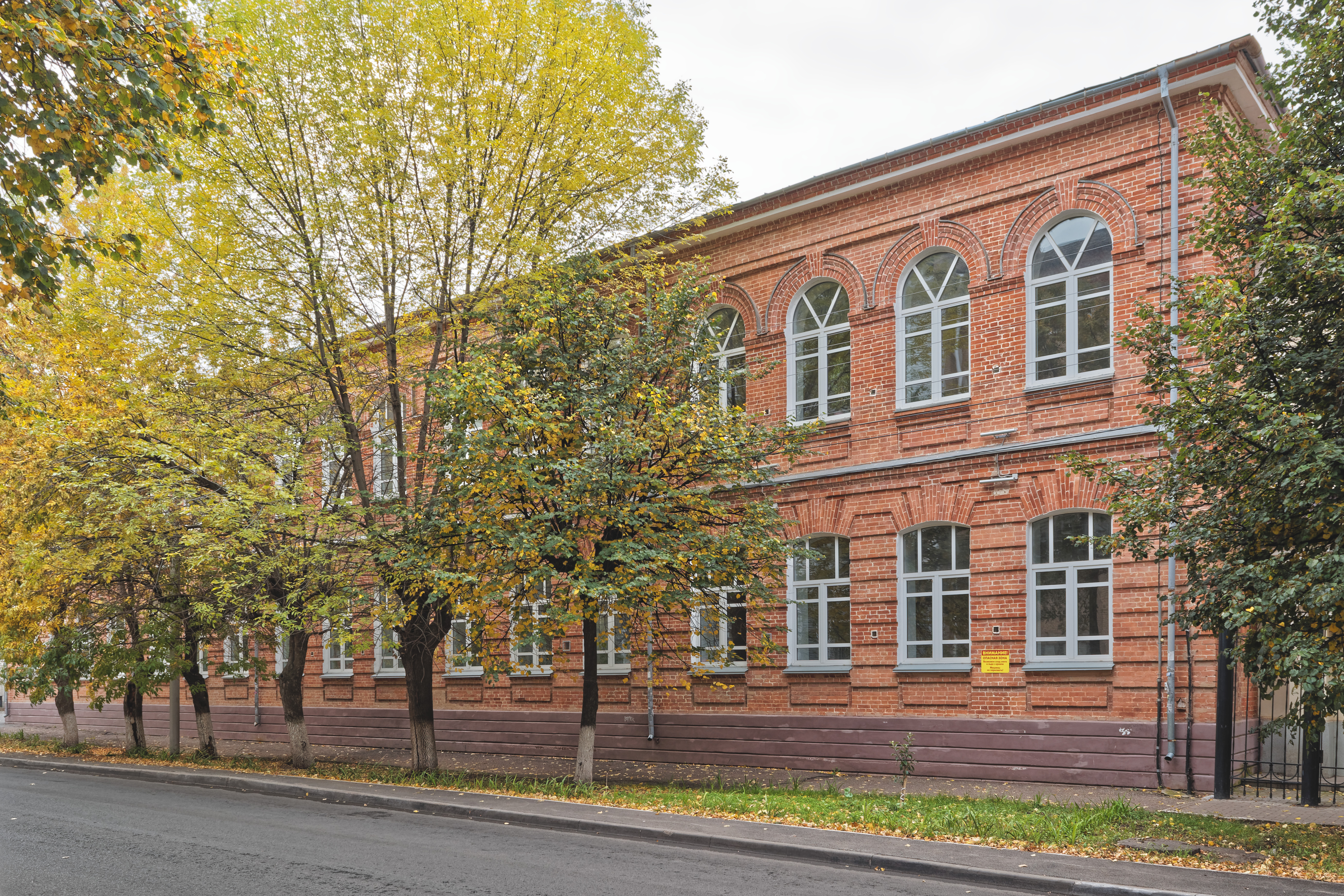 Вторая женская гимназия; здесь в мае 1917 г. проходила первая Уфимская Губернская конференция РСДРП: улица Коммунистическая, 19 / улица Зенцова, Уфа, Башкортостан